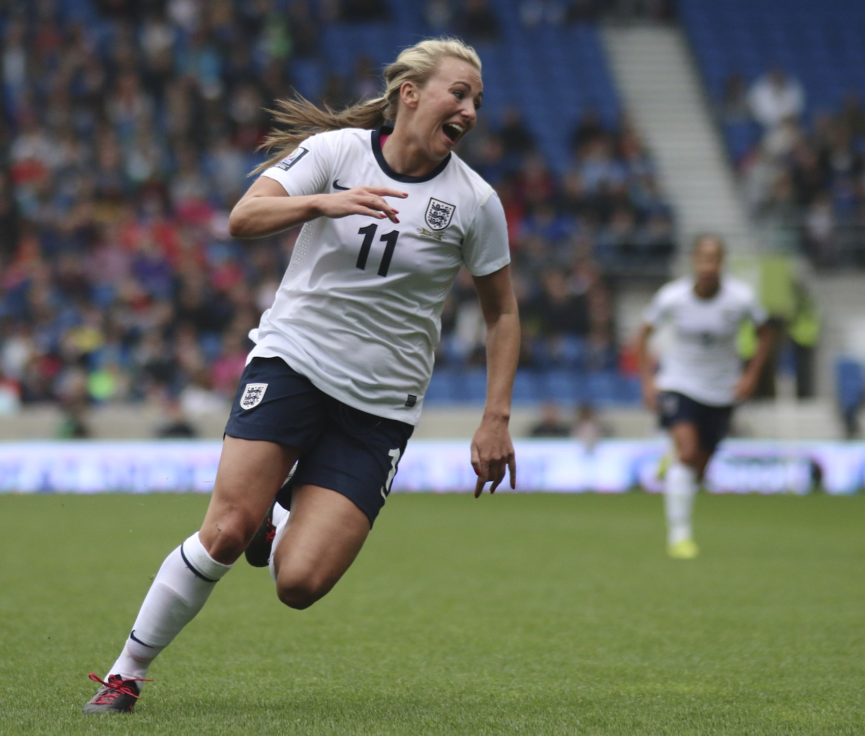 Toni Duggan of England